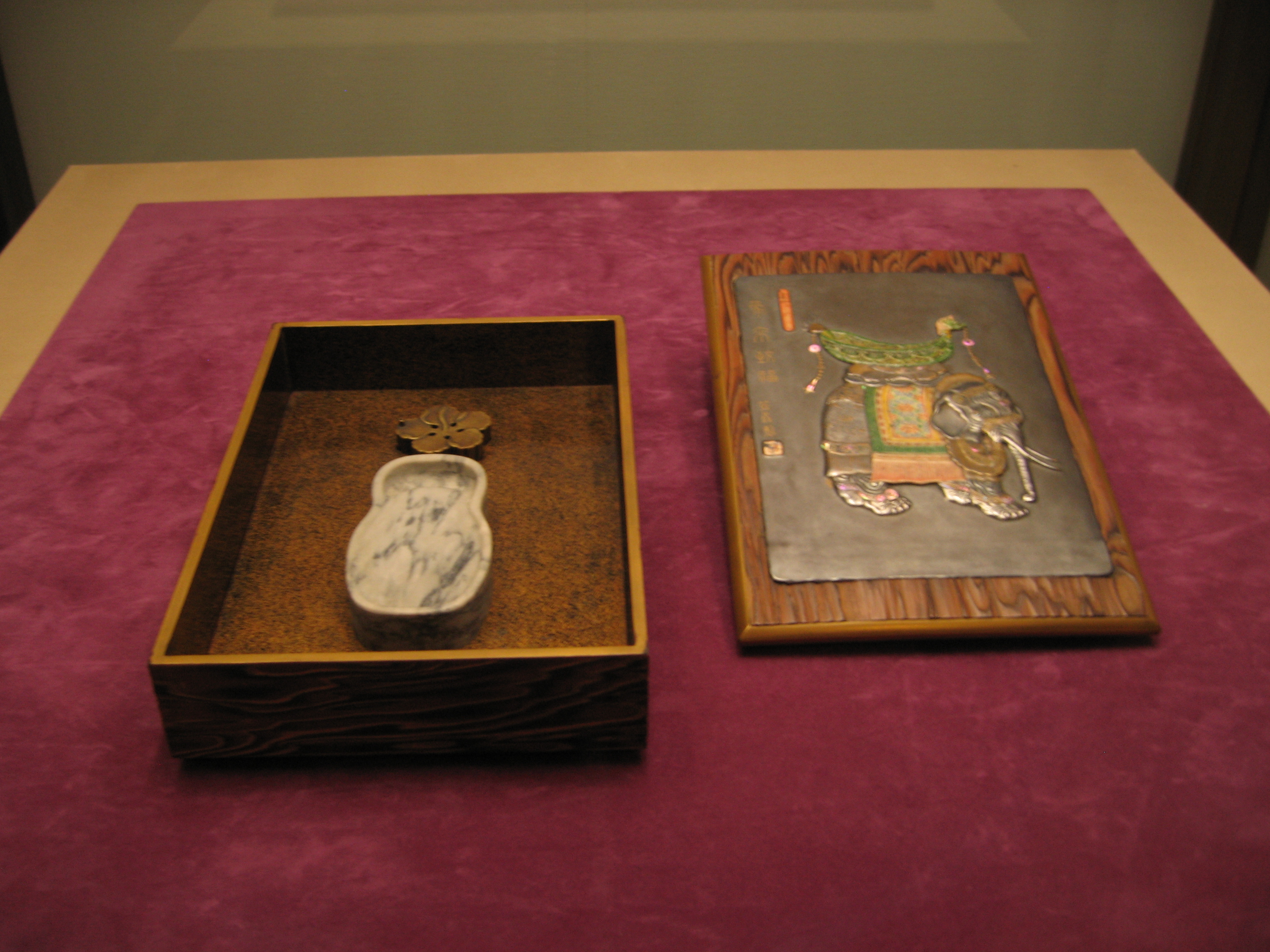 白身がかった硯